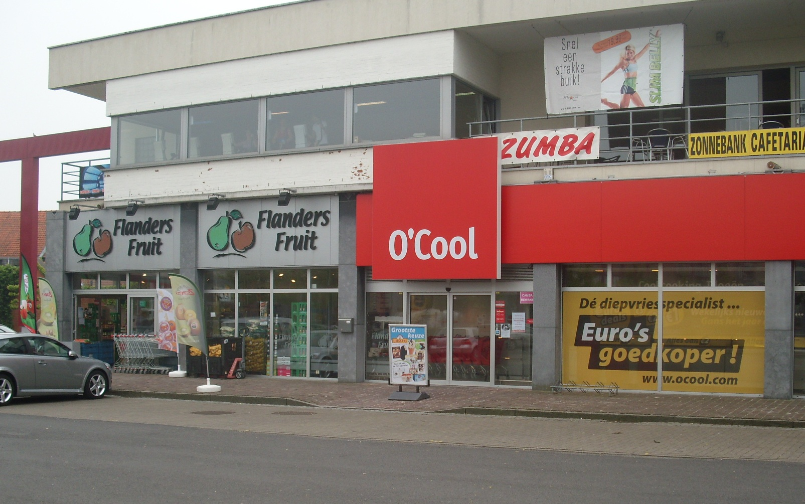 O'Cool in het Kruger Shopping Center in Eeklo - Oost-Vlaanderen - België